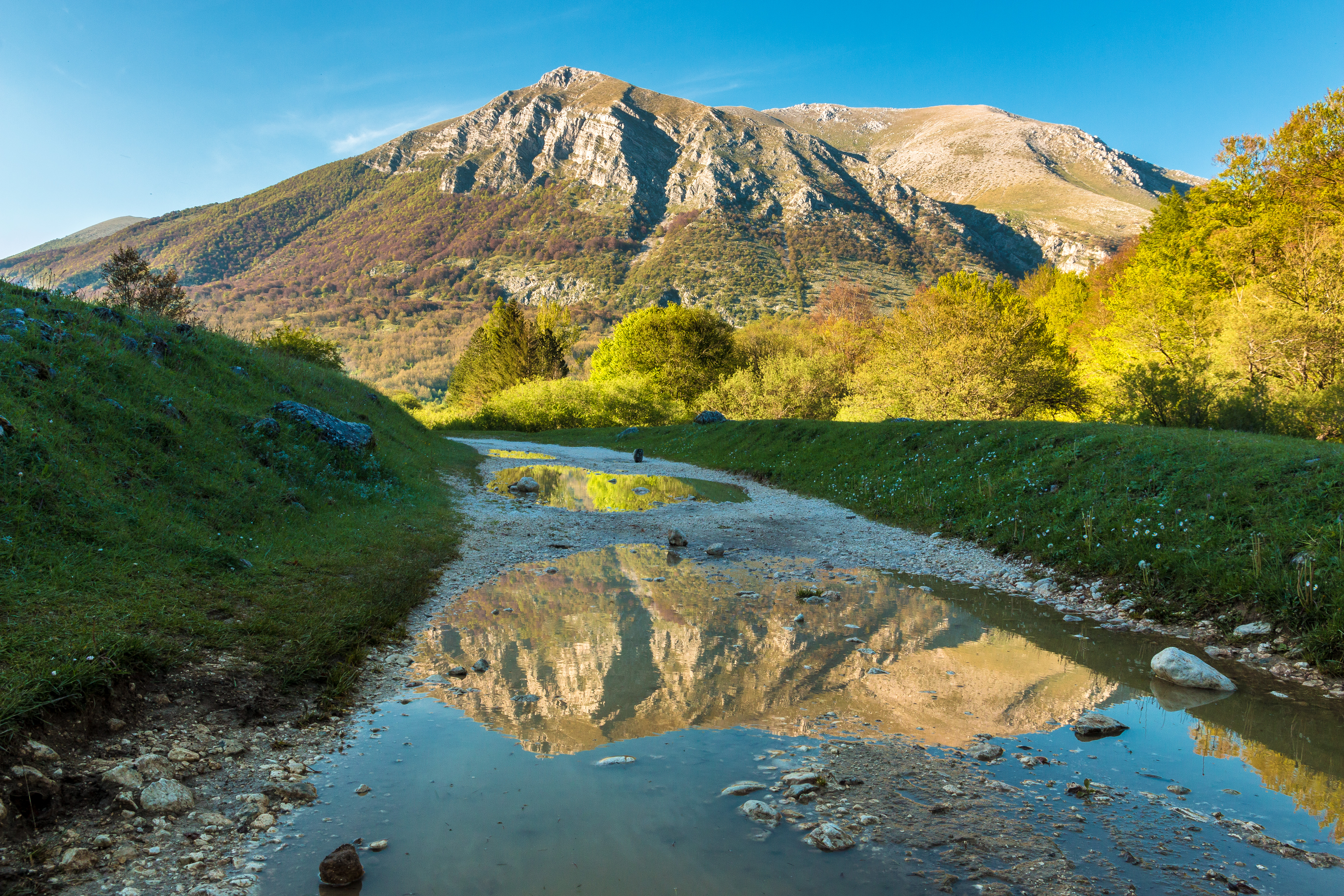 Monte Marsicano allo specchio This is a photo of a monument which is part of cultural heritage of Italy.